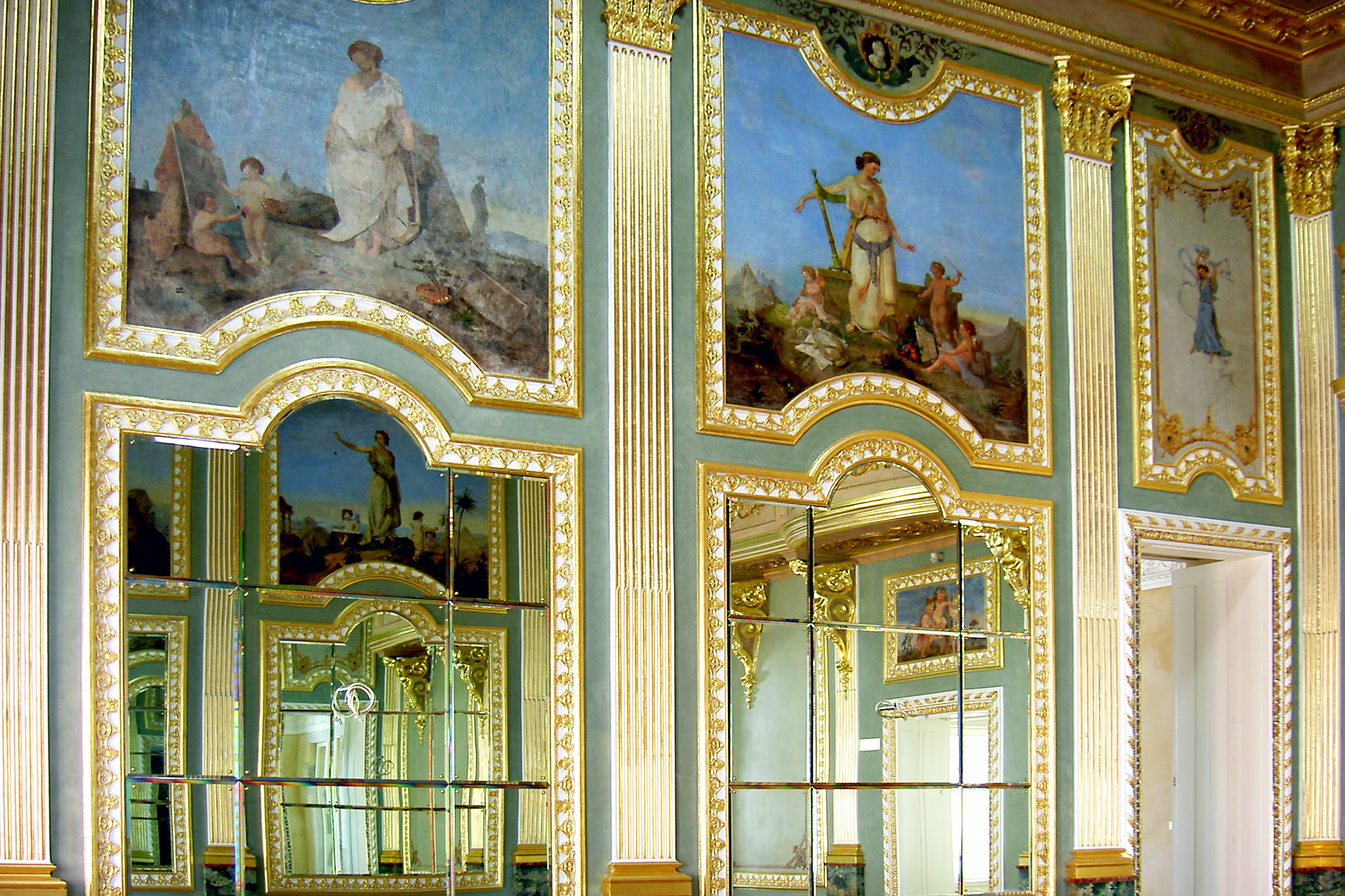 Palácio do Freixo This file was uploaded for Wiki Loves Monuments in Portugal with the unique identifier 70403.